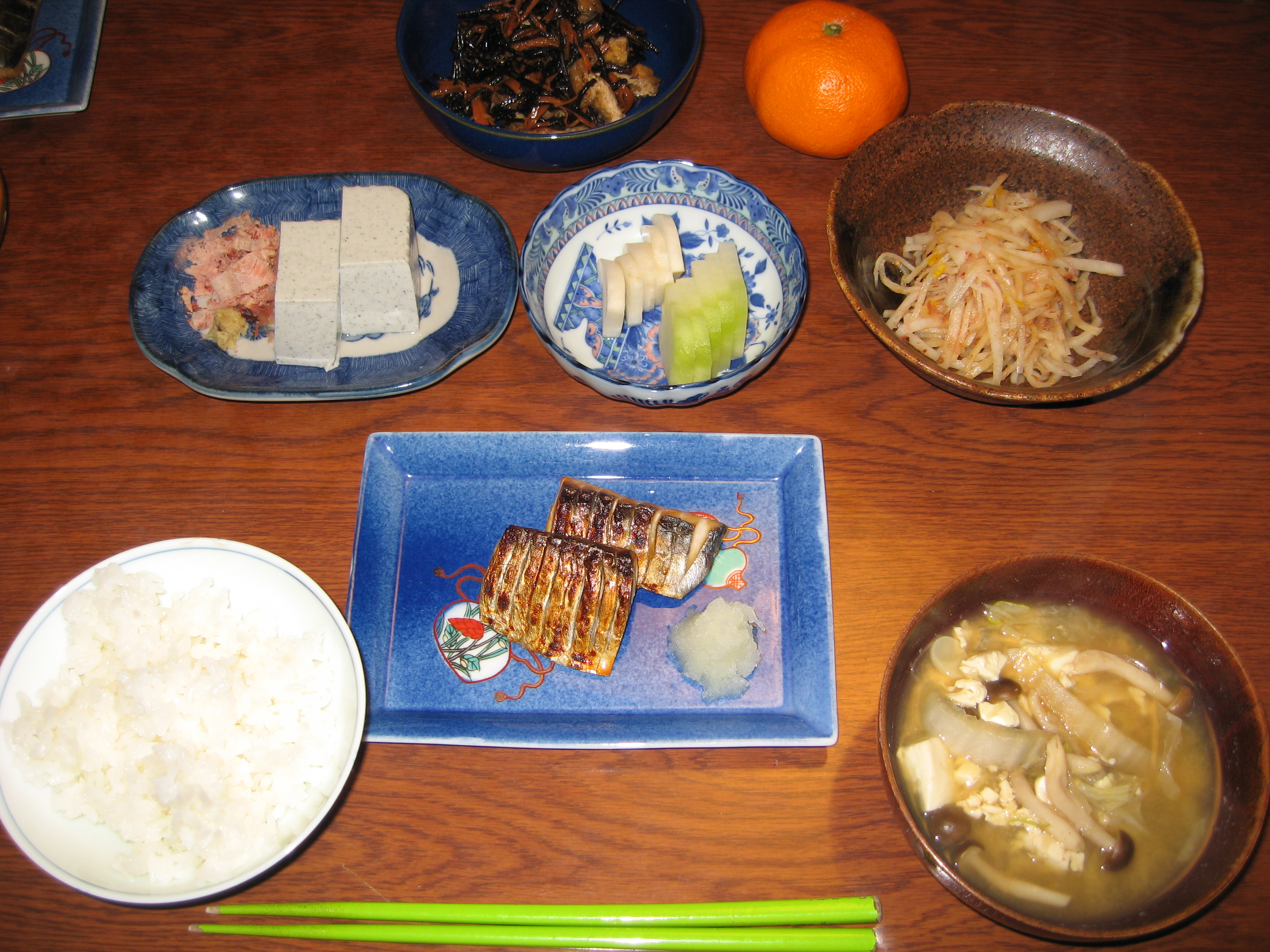 日本の一般家庭の夕食の献立例 一汁三菜(四菜)